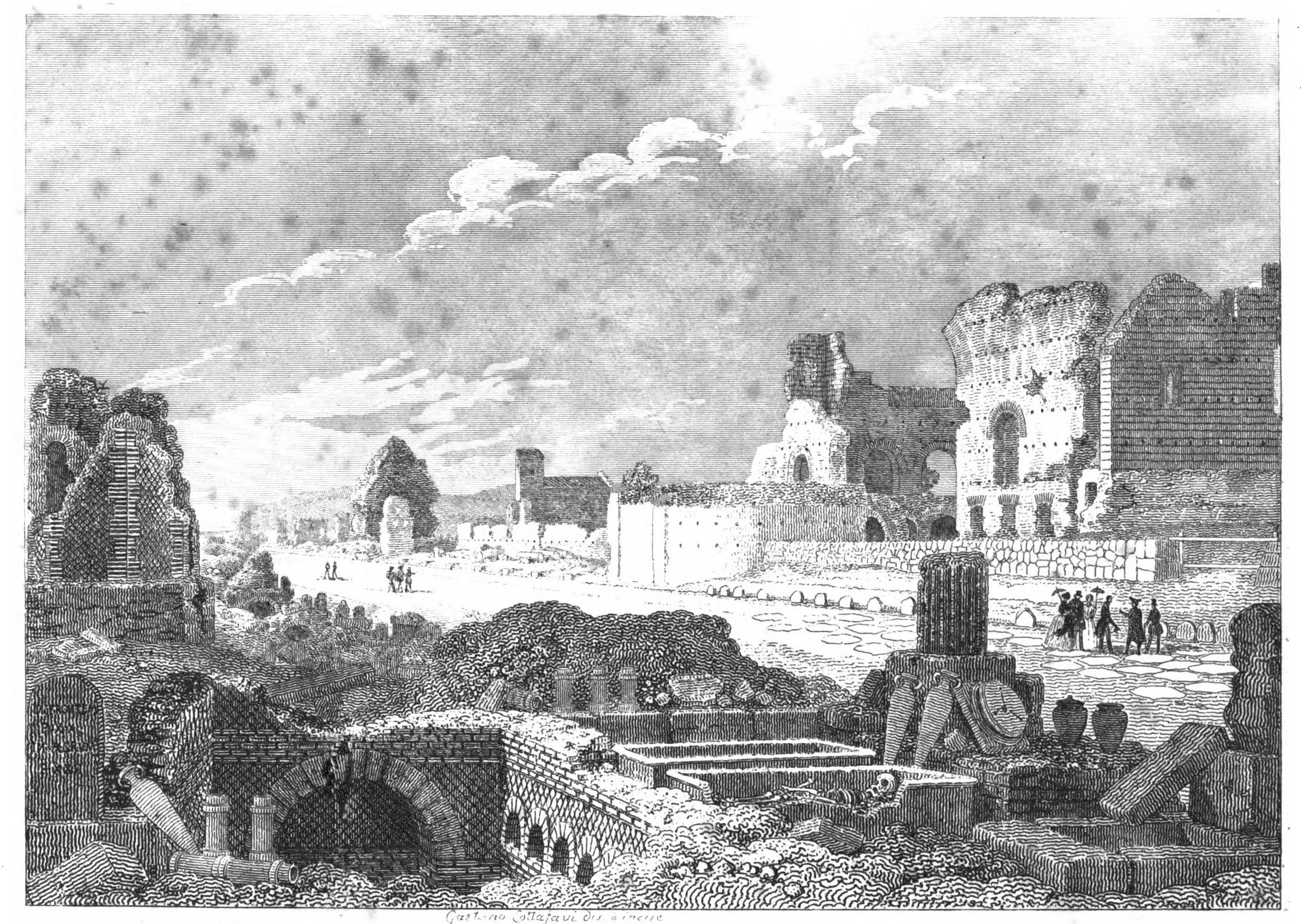 Engraving from "Memoria sullo scavo della Via Appia", by Agostino Jacobini, Tipografia delle Belle Arti, Roma 1851